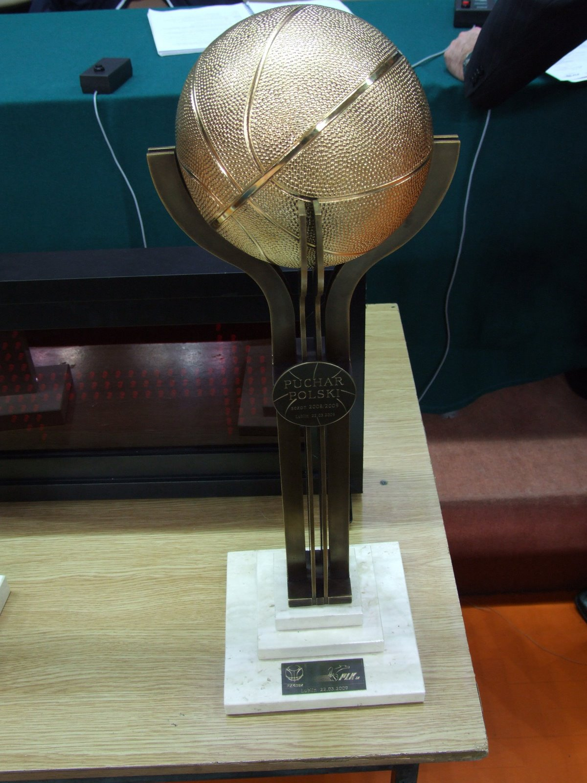 Trofeum przyznawane zwycięzcy Pucharu Polski w koszykówce mężczyzn